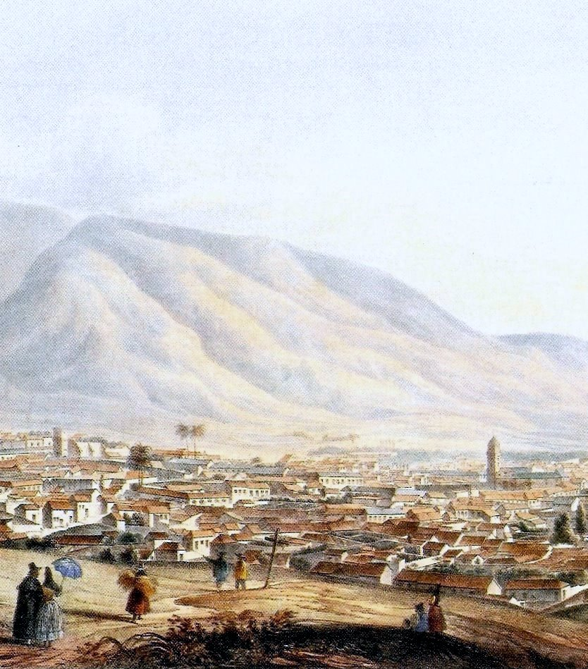 Vista de Caracas por John Thomas 1839.